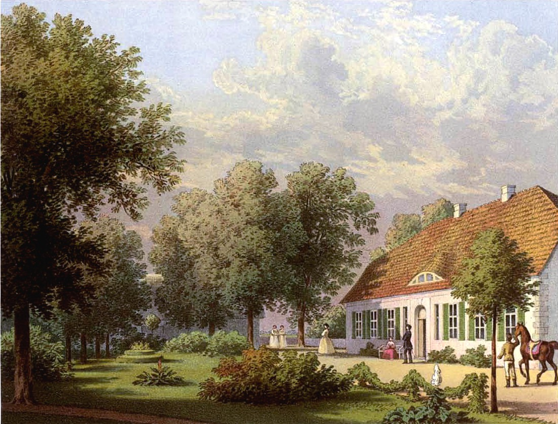 Rittergut Zubzow, Lithografie aus dem 19. Jahrhundert